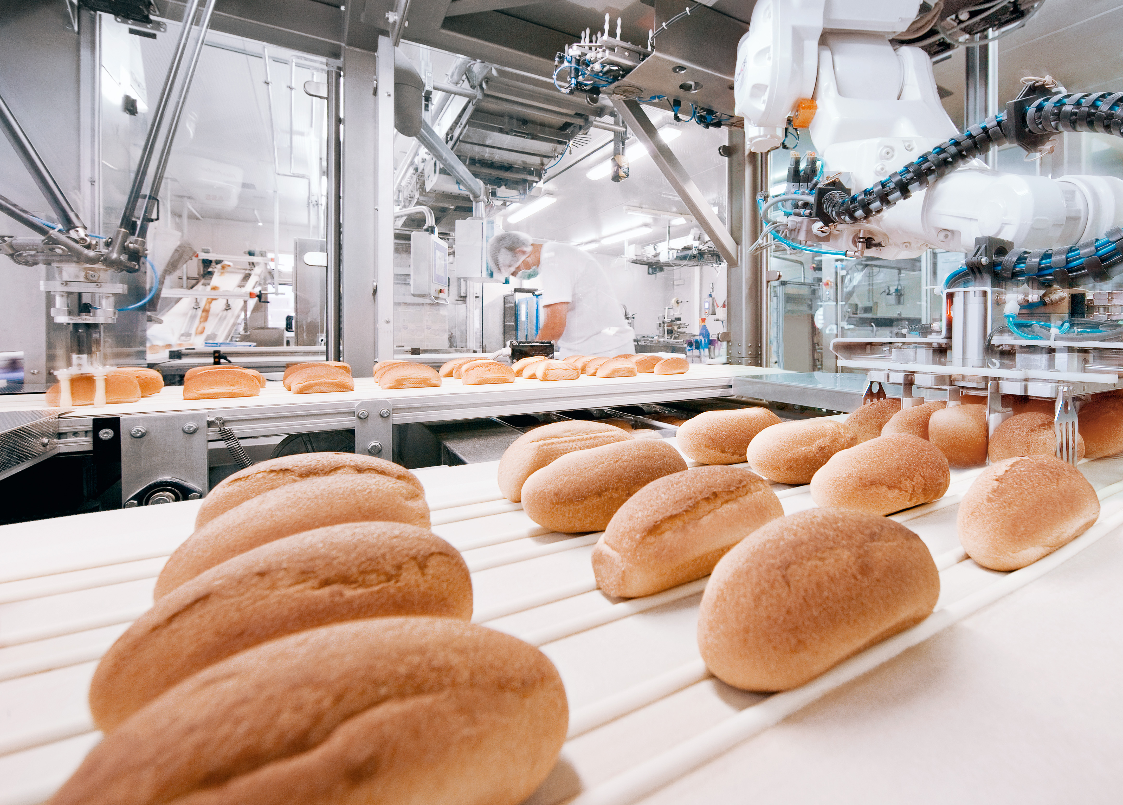 Dr. Schär Produktion